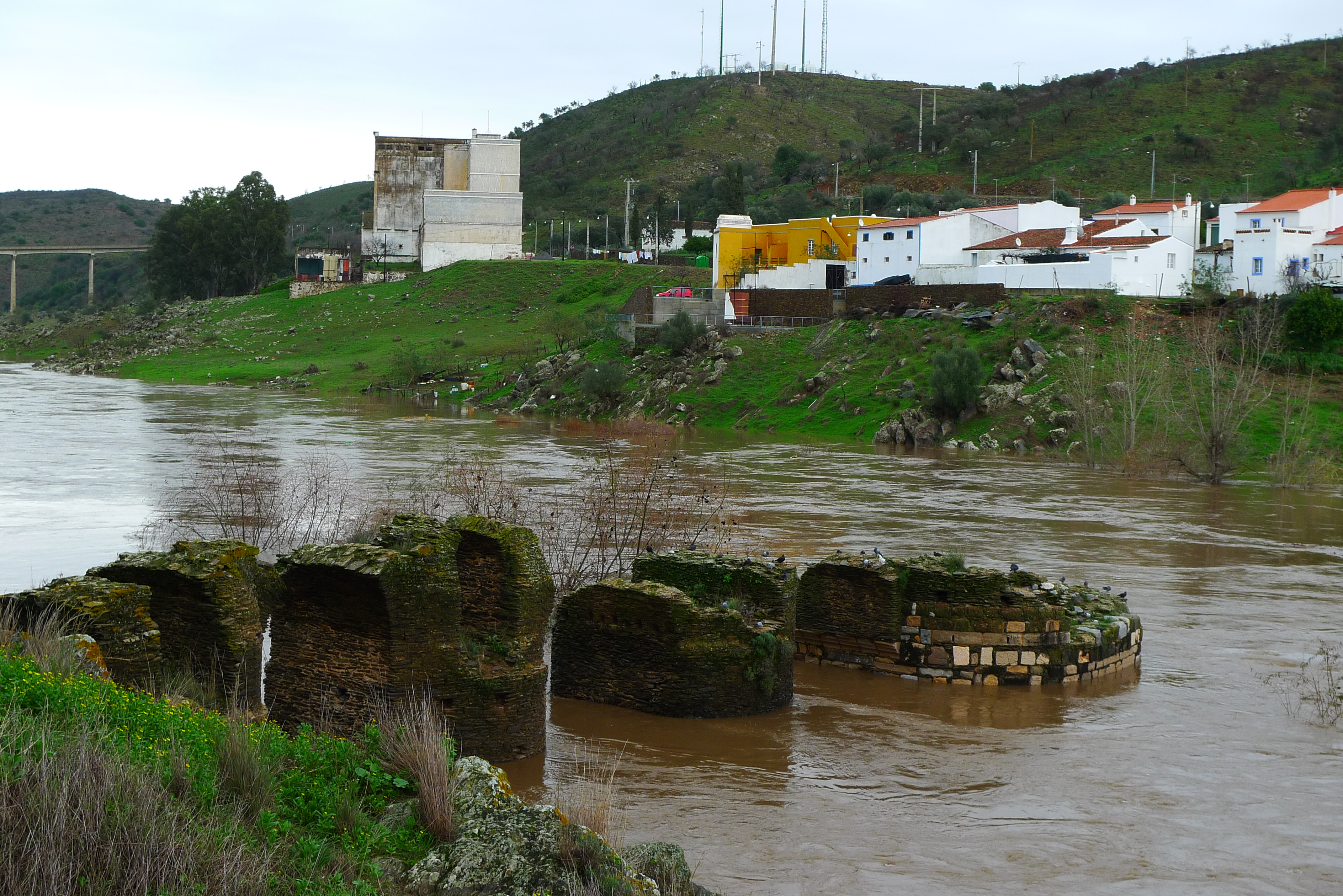 Torre del Río en una riada. This file was uploaded for Wiki Loves Monuments in Portugal with the unique identifier 70233.